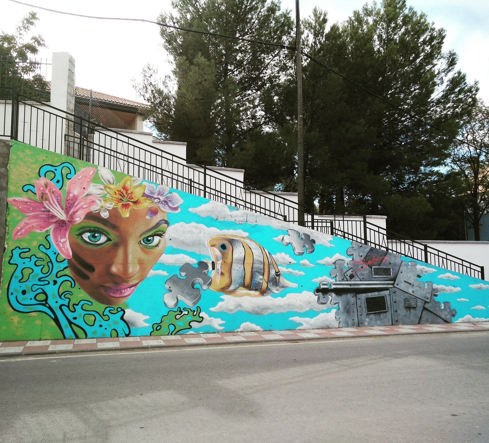 Ventas de Huelma